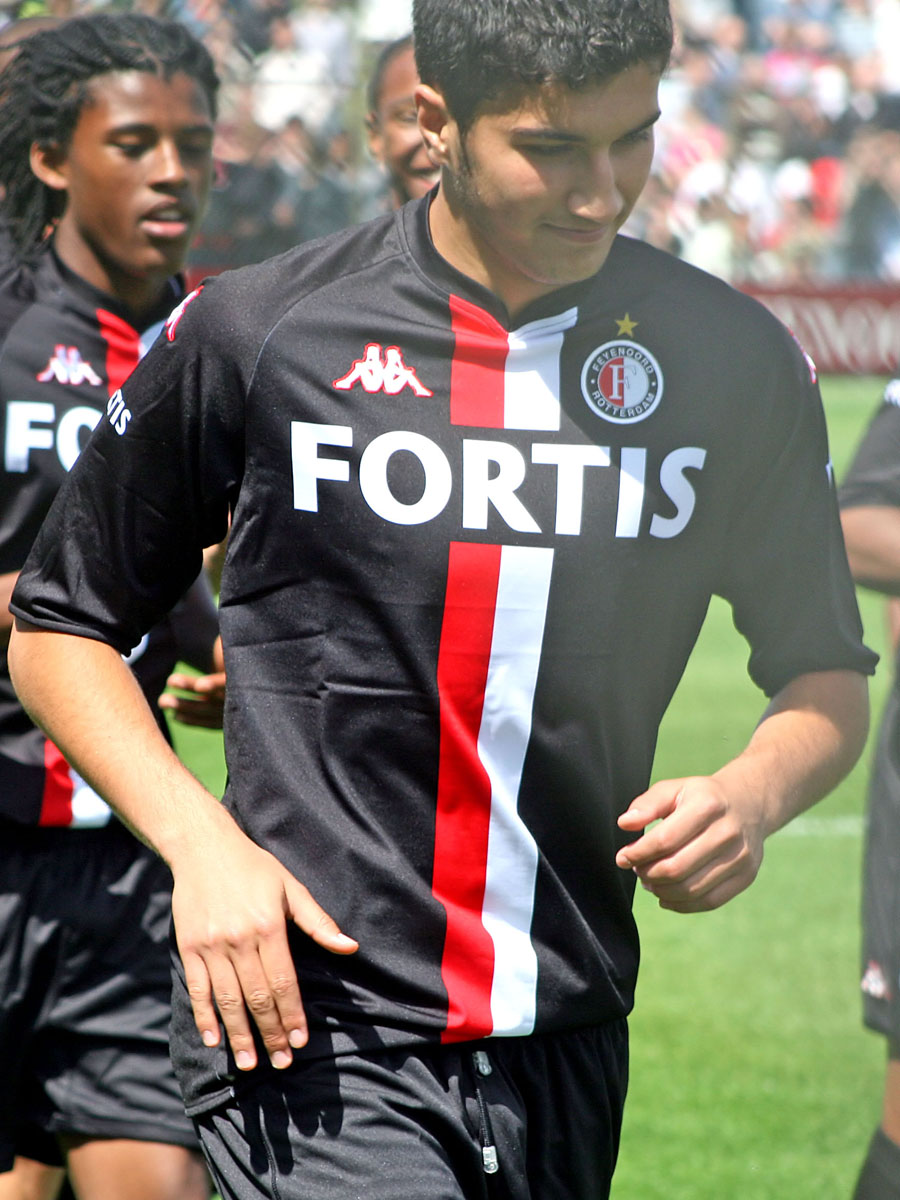 Nuri Sahin (Feyenoord)